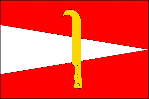 Vlajka obce Pravčice